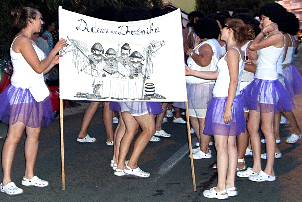 Maškarana skupina "Didovi iz Drežnika" u Dramlju